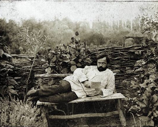 Микола Міхновський під час відпочинку.